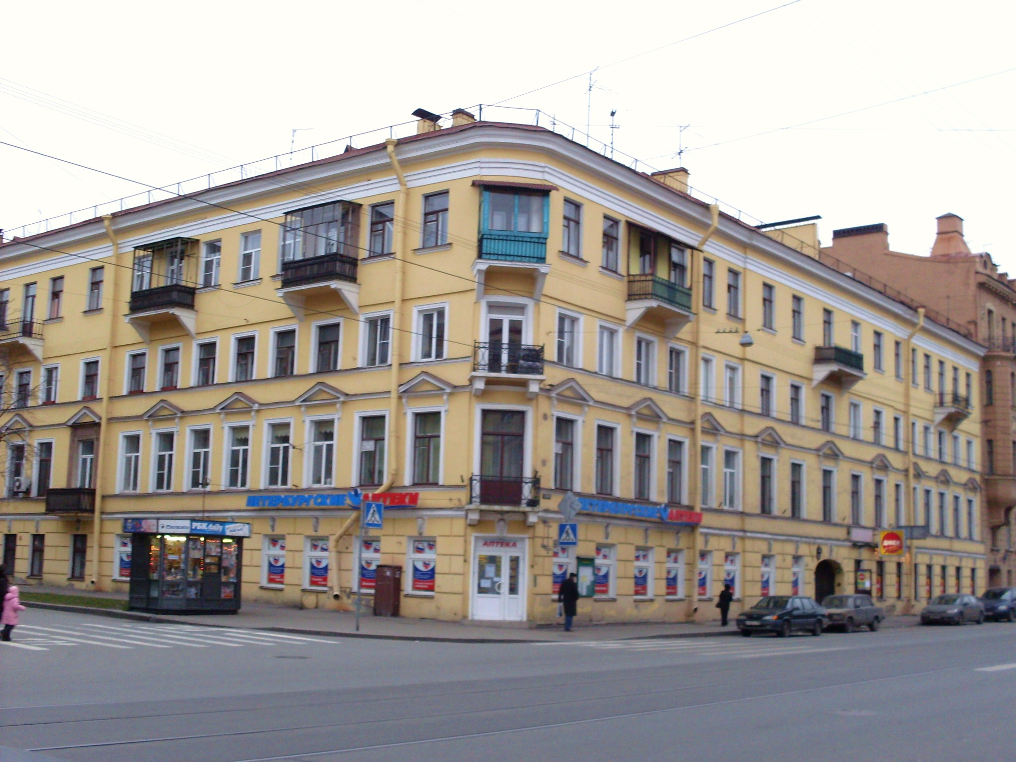 Доходный дом Фитингоф (Садовая № 68), Петербург